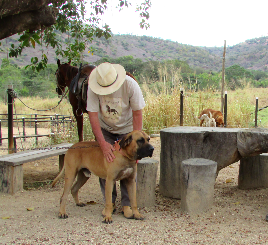 Cão OFB macho adulto